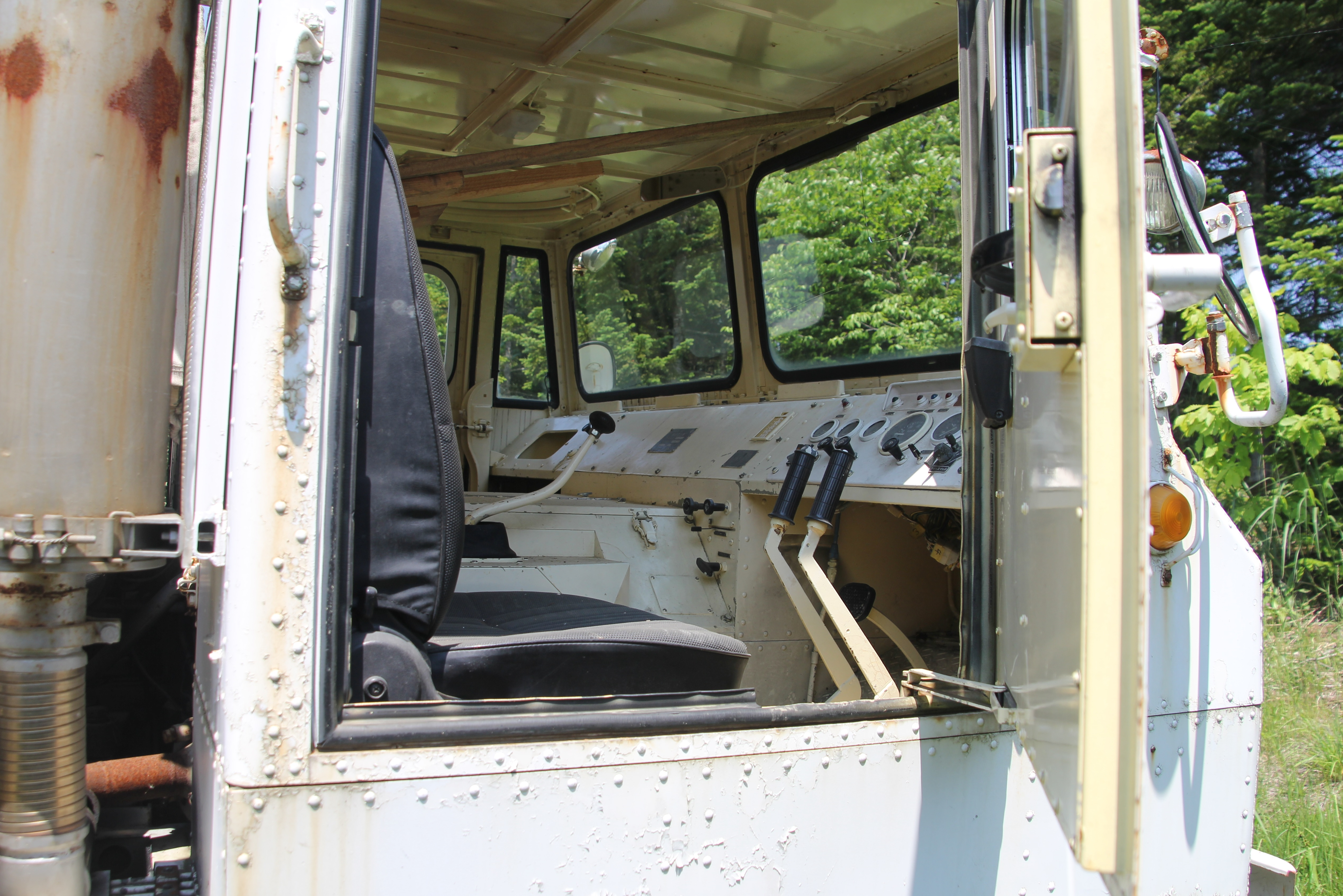 大原鉄工所製造の78式雪上車の操縦席 初期型の特徴であるシフトレバーの形状が確認できます。